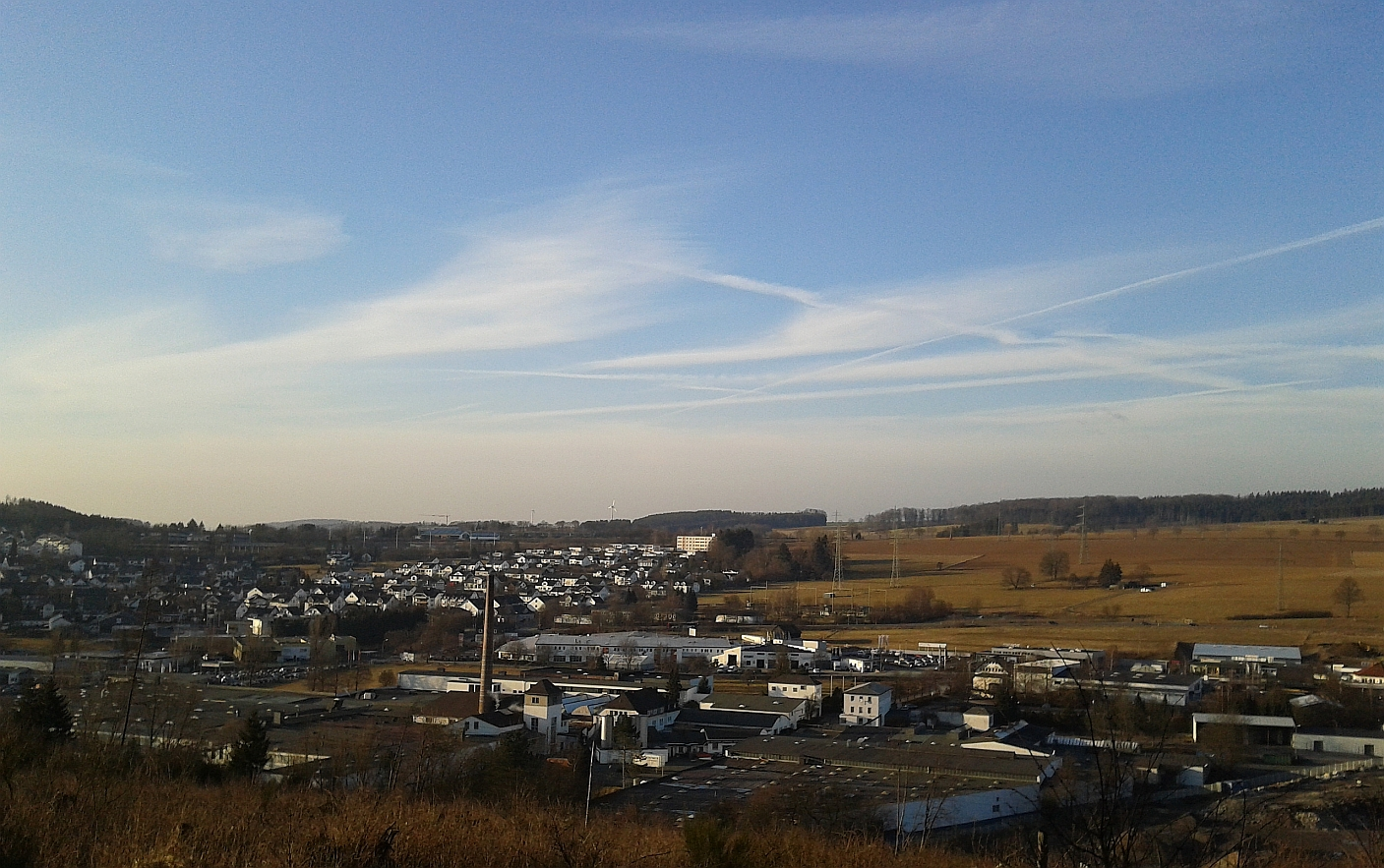 Gewerbegebiet Lake in Schmallenberg (Germany)